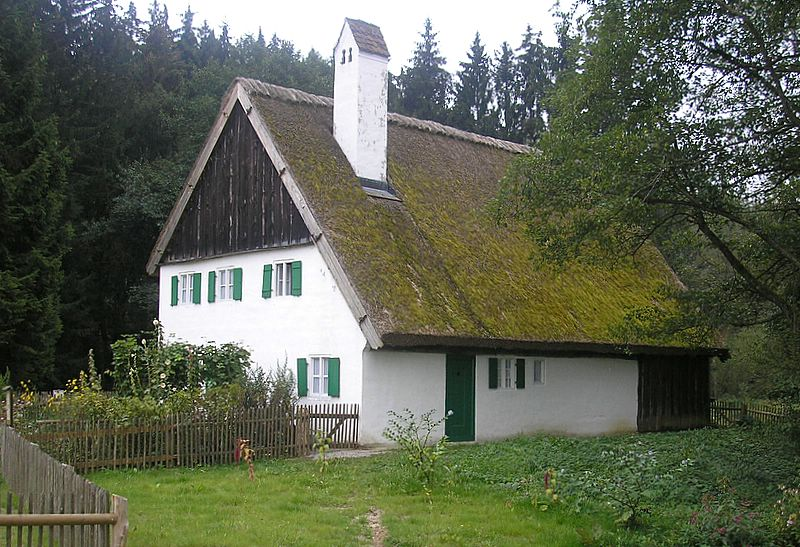 Bauernhausmuseum Staudenhaus (Oberschönenfeld, Landkreis Augsburg, Bayern). Gesamtansicht. Eigene Aufnahme, Sept. 2006 / Open air museum Staudenhaus (Oberschoenenfeld near Augsburg, Bavaria, Germany). Total view. Own photo, Sept. 2006